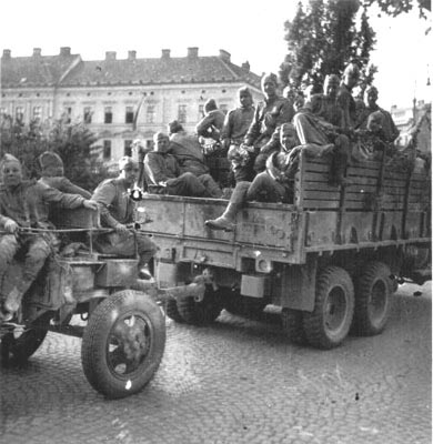 Rudí armáda ve Znojmě - začátek května 1945